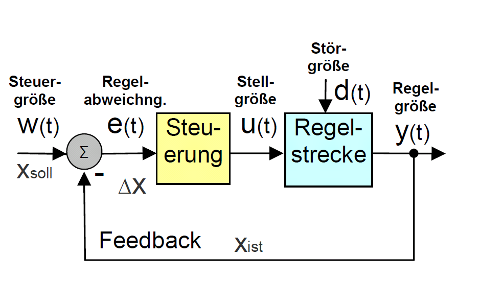 einfacher Regekreis als Blockdiagramm